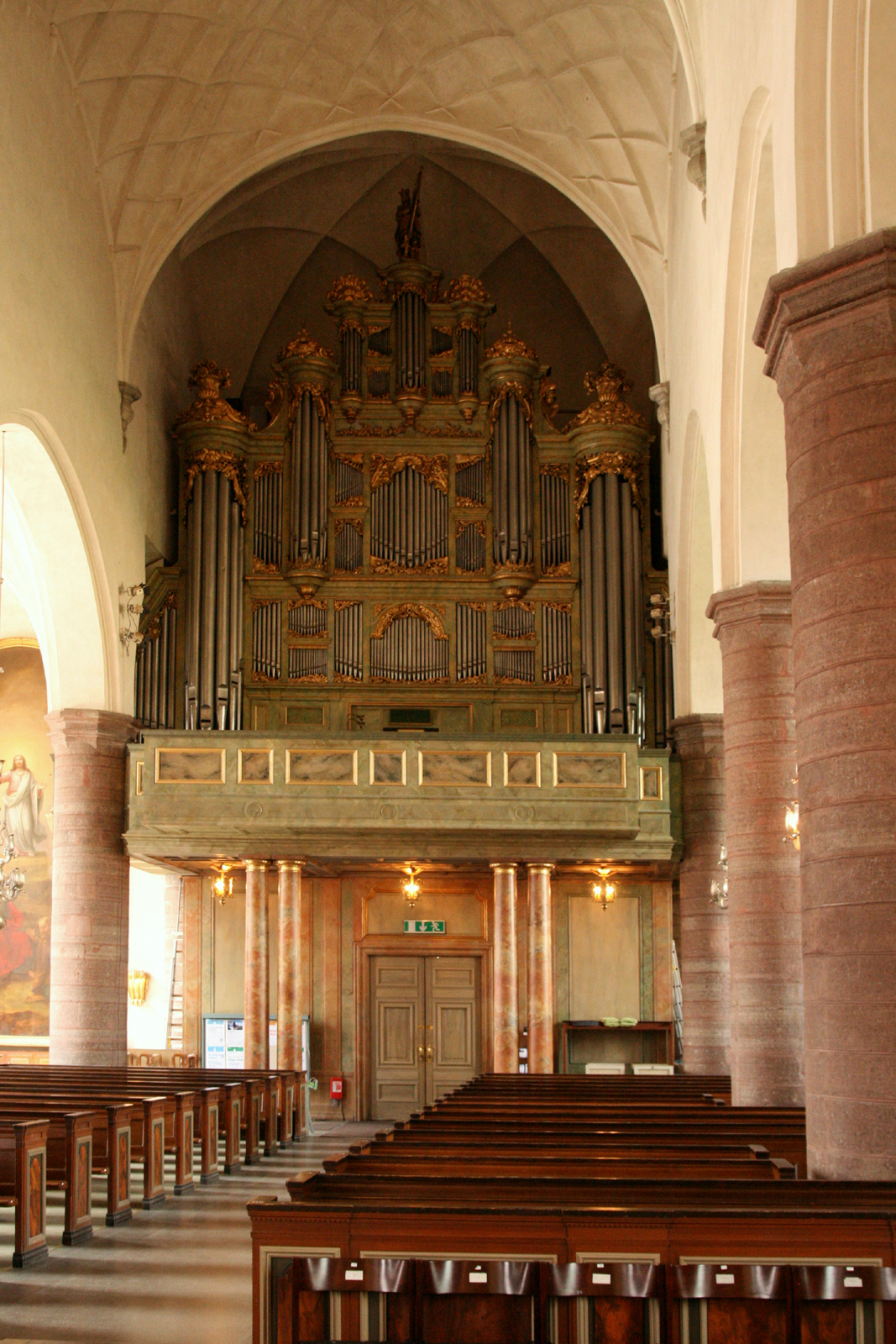 Intérieur de l'Eglise Saint James à Stockholm